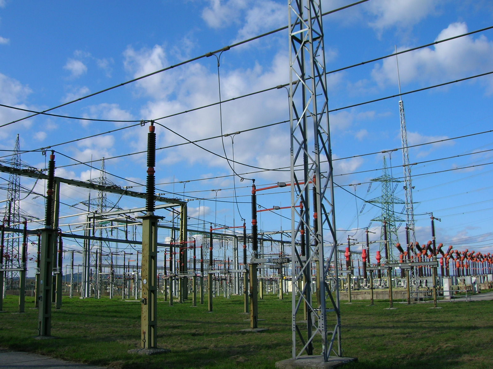 Umspannwerk Bisamberg der VERBUND-Austrian Power Grid AG